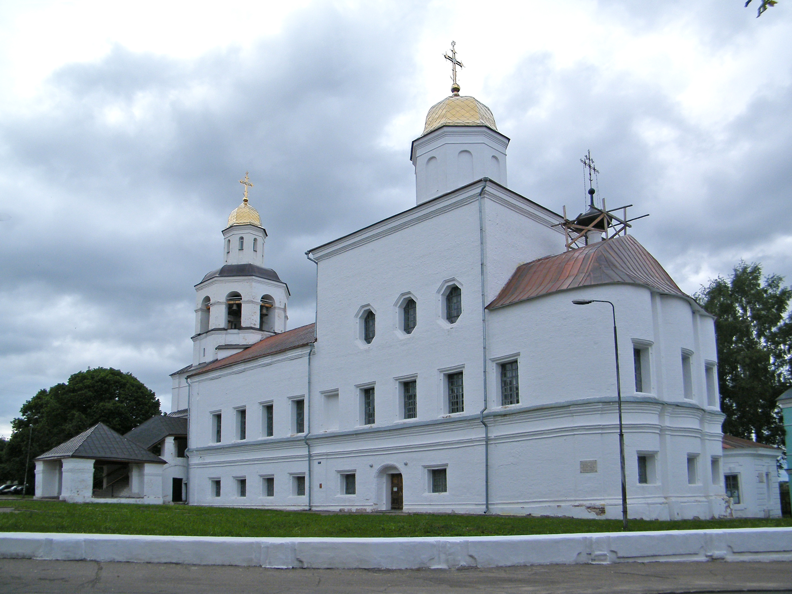 Вознесенский собор